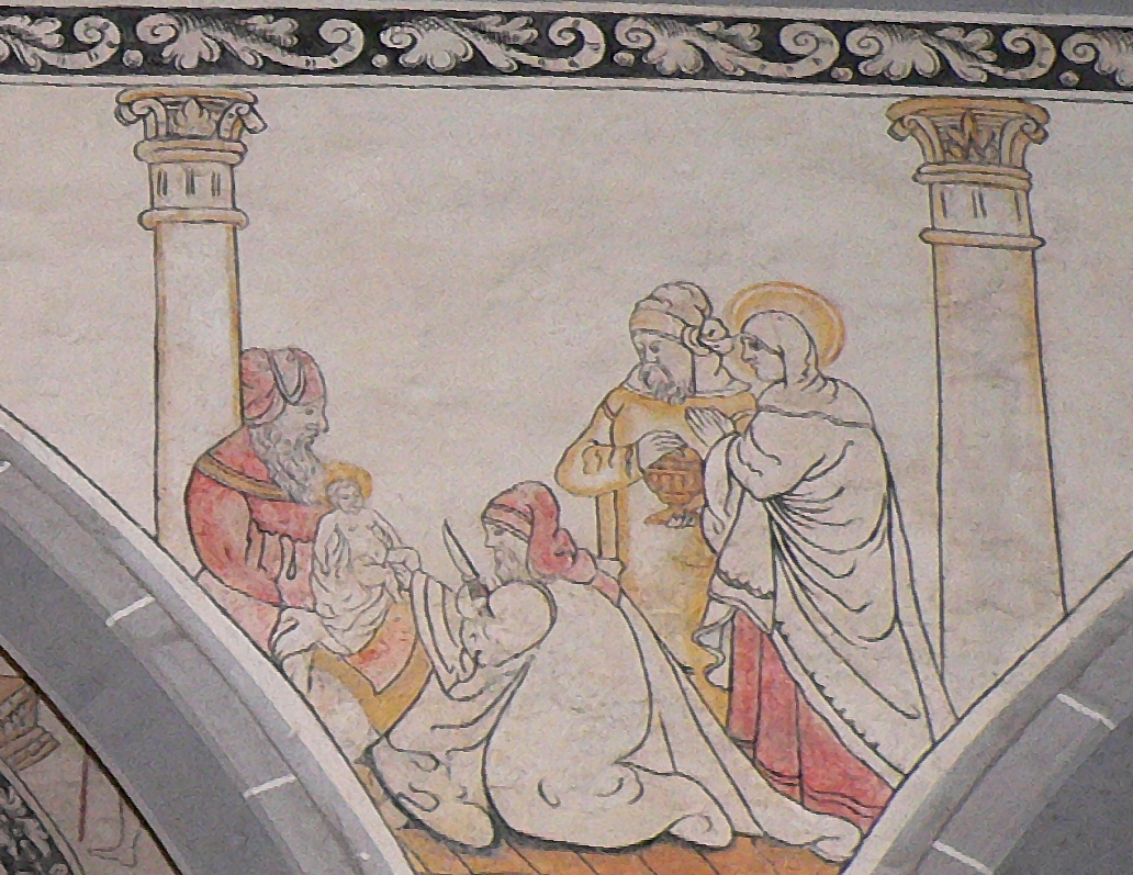 Evangelische Kirche St. Laurentius in Dassel, Niedersachsen, Deutschland - Protestantische Renaissancemalerei (Secco): "Jesu Beschneidung" von 1577